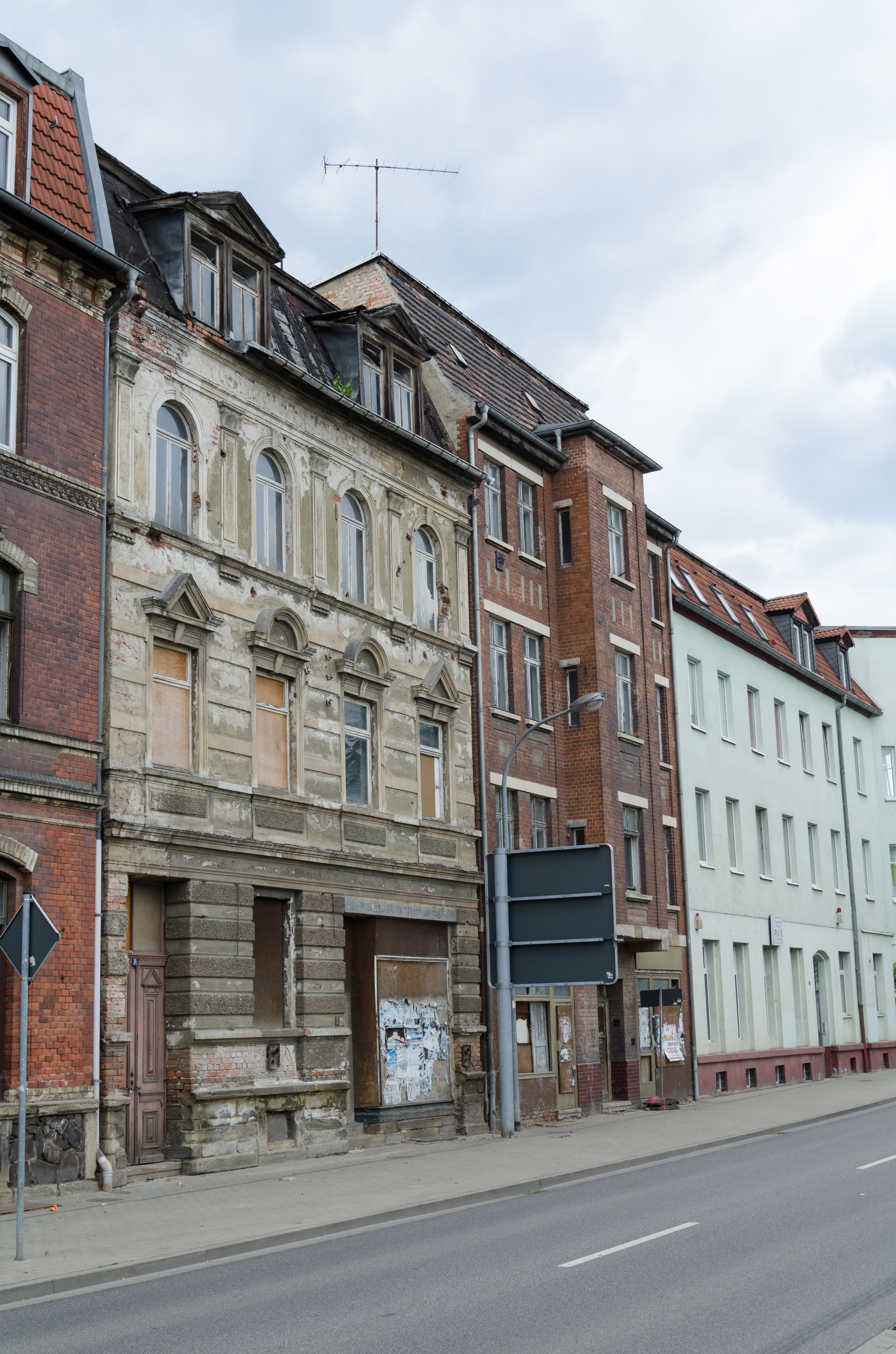 Zeitz, Badstubenvorstadt 8f